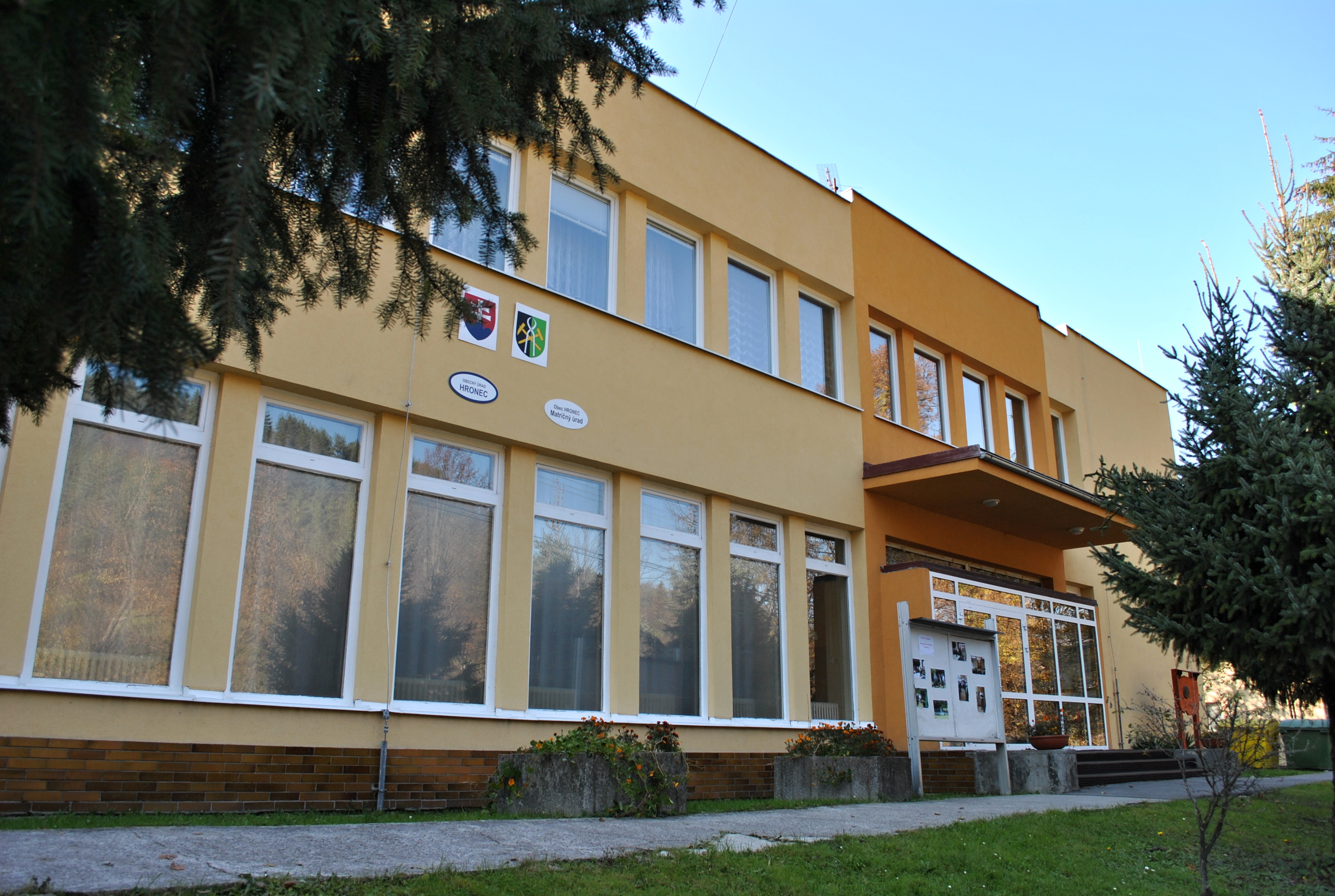 Hronec, okr. Brezno - obecný úrad